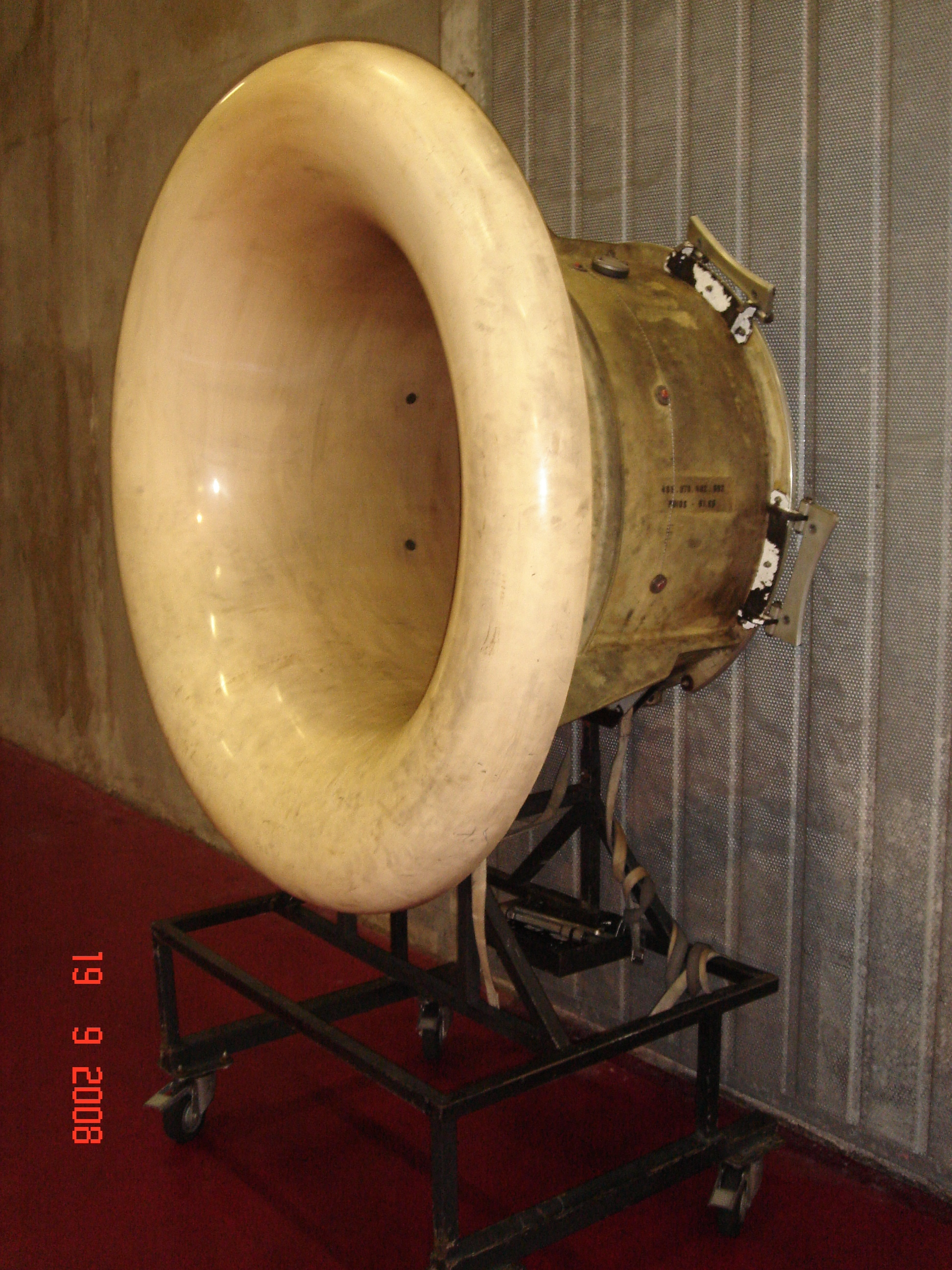 Pavillon utilisé comme manche d'entrée d'air sur turboréacteur M53 pour les essais dans un Banc fermé